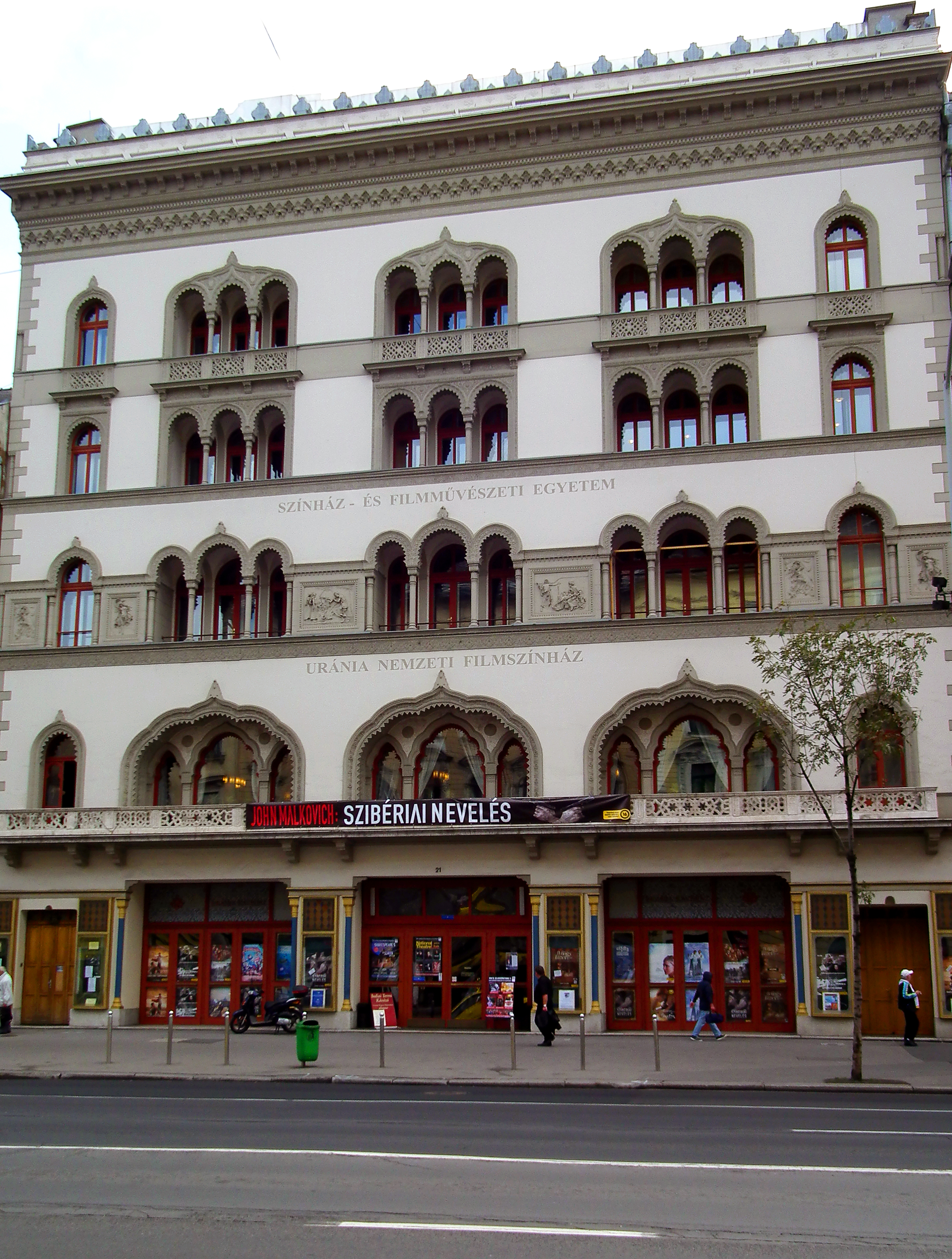 Uránia mozi This is a photo of a monument in Hungary. Identifier: 956